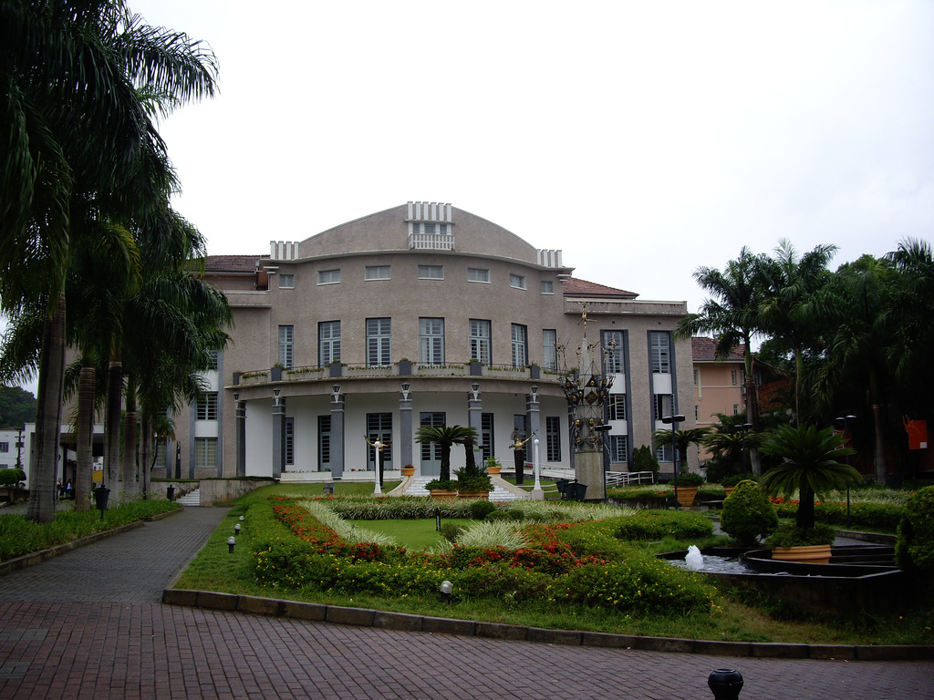 Entrada do Teatro Carlos Gomes em Blumenau.